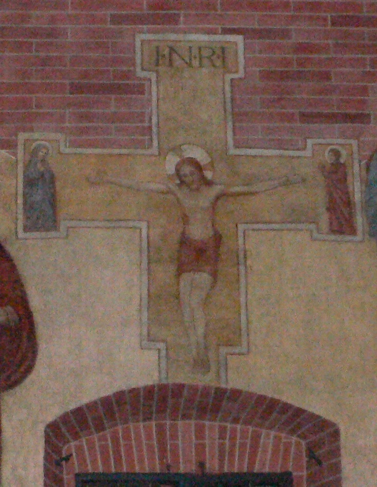 byzantinisches Kreuz